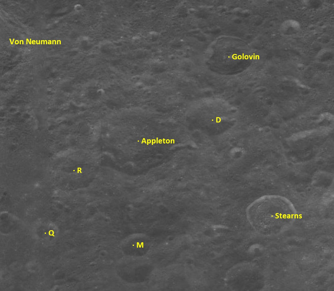 Fotografía del cráter Appleton (Misión lunar Clementine)